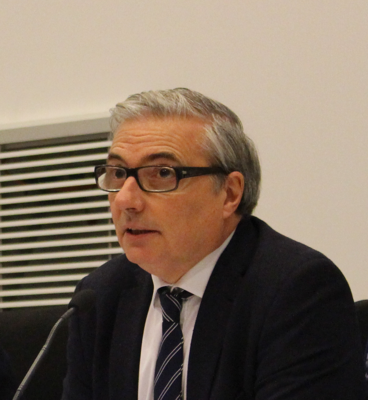 Jean-Pierre Stroobants, journaliste du quotidien Le Monde aux journées Eurotémis 2015 à Sciences Po Bordeaux.